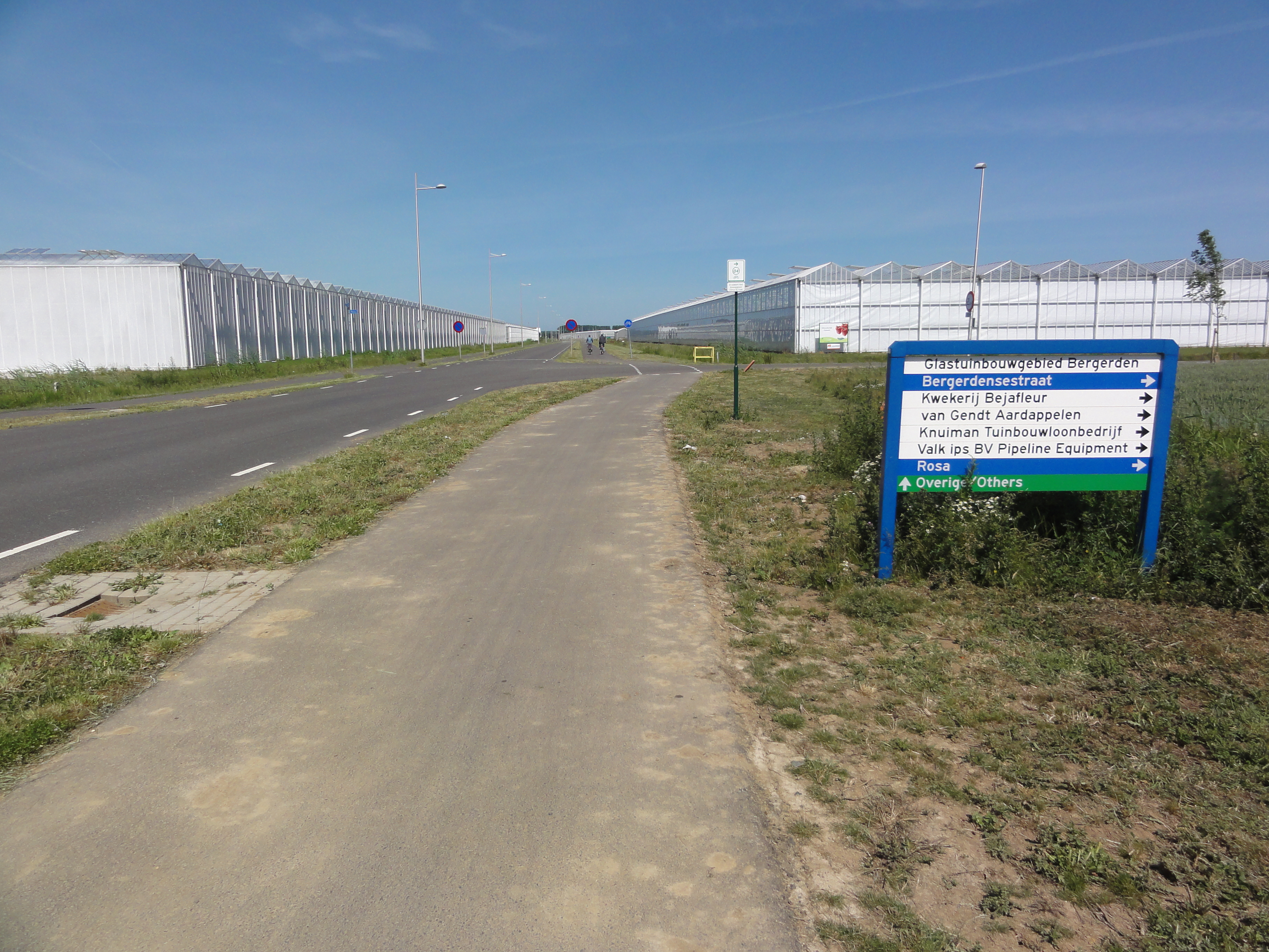 Bemmel (Lingewaard) glasuinbouwgebied Bergerden, straat met fietspaden